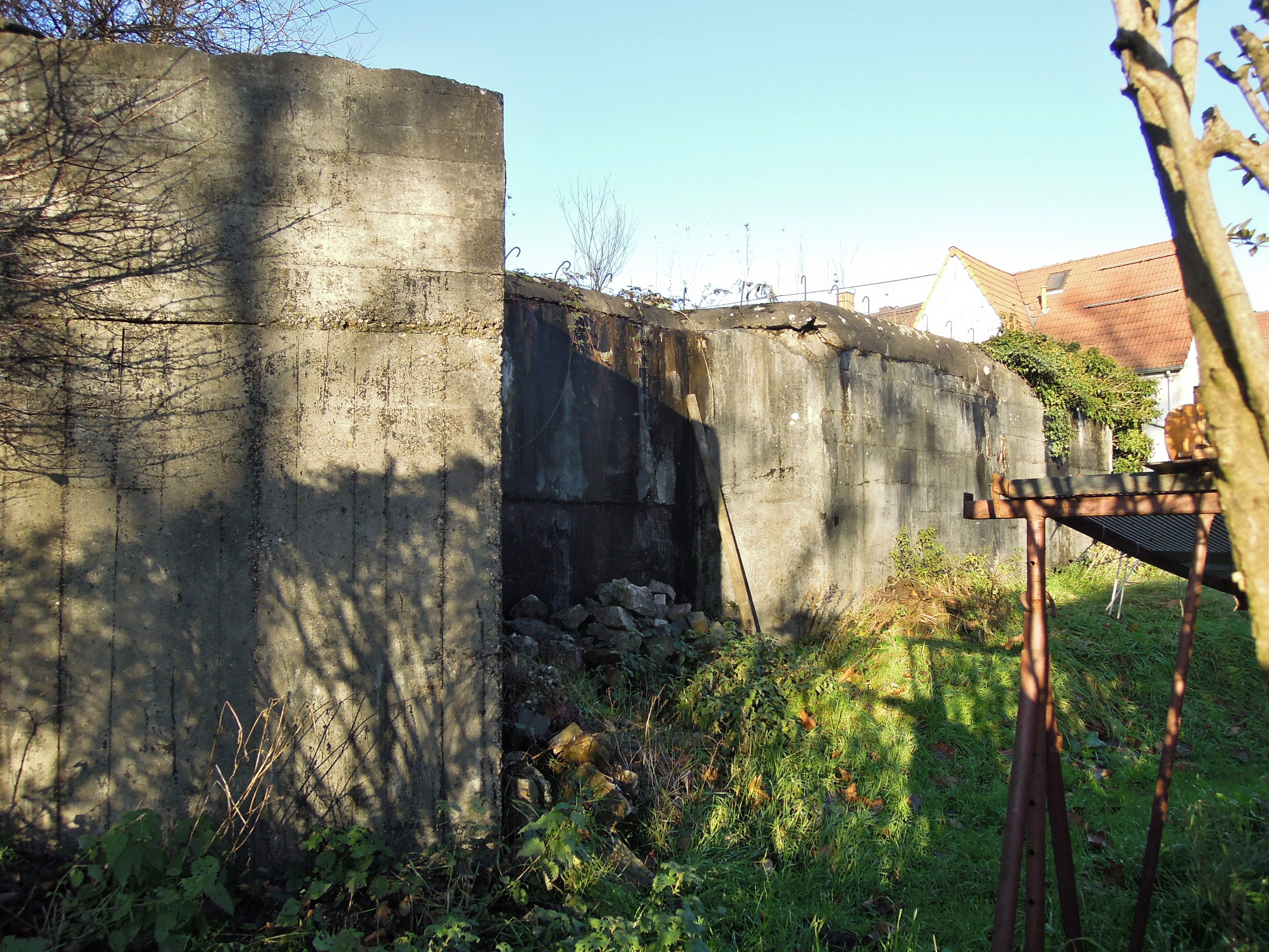 Westwallbunker WH73 in Dillingen/Diefflen an der Ecke Umgehungsstraße,Primsstraße